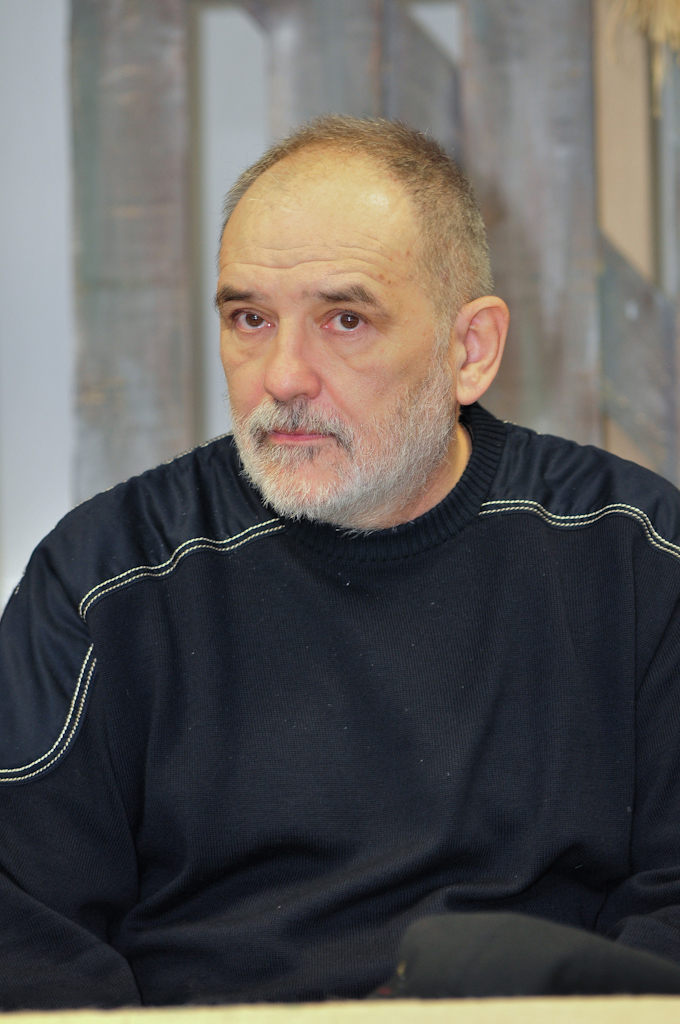 Ђорђе Балашевић